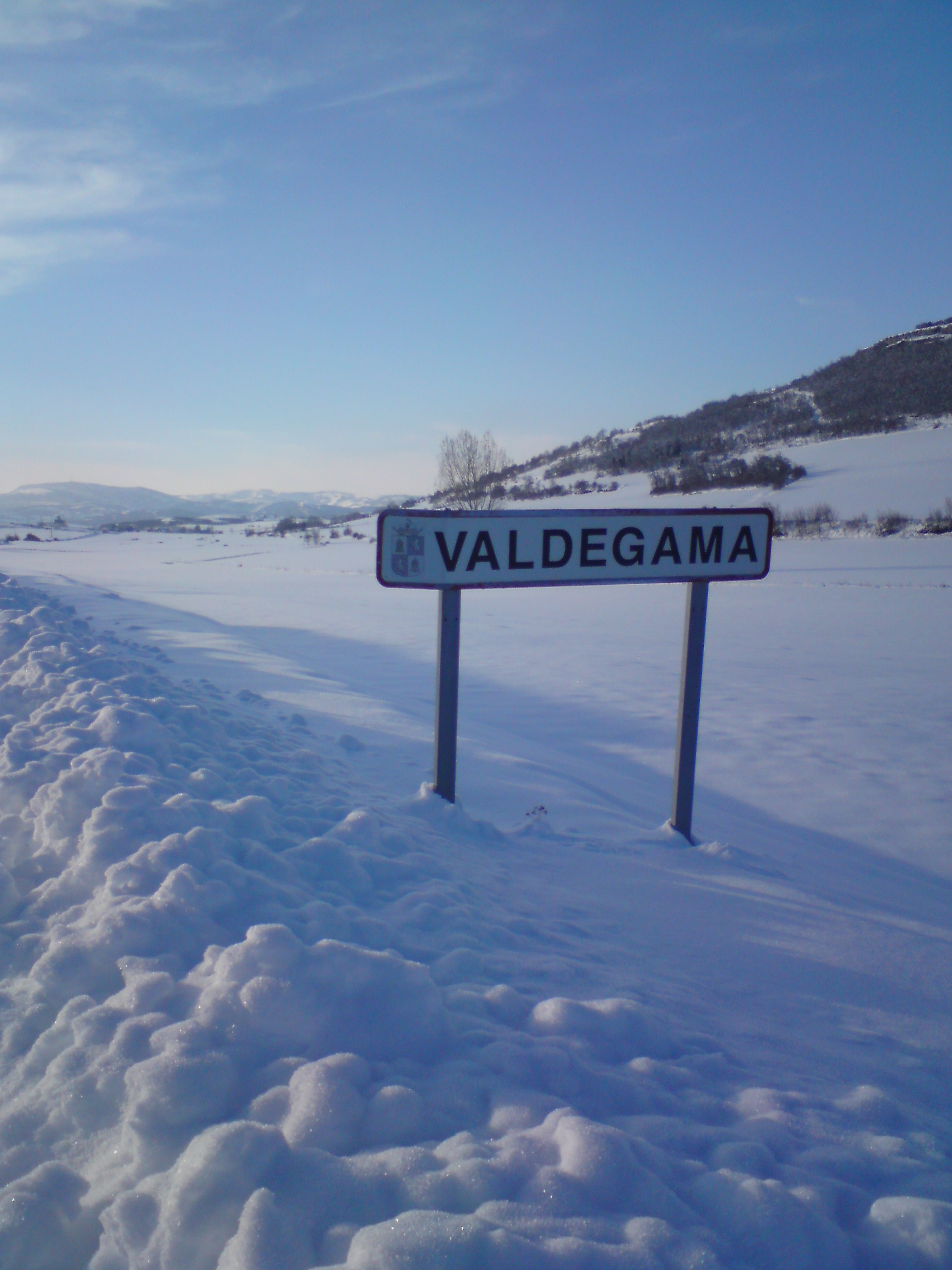 La entrada al pueblo....